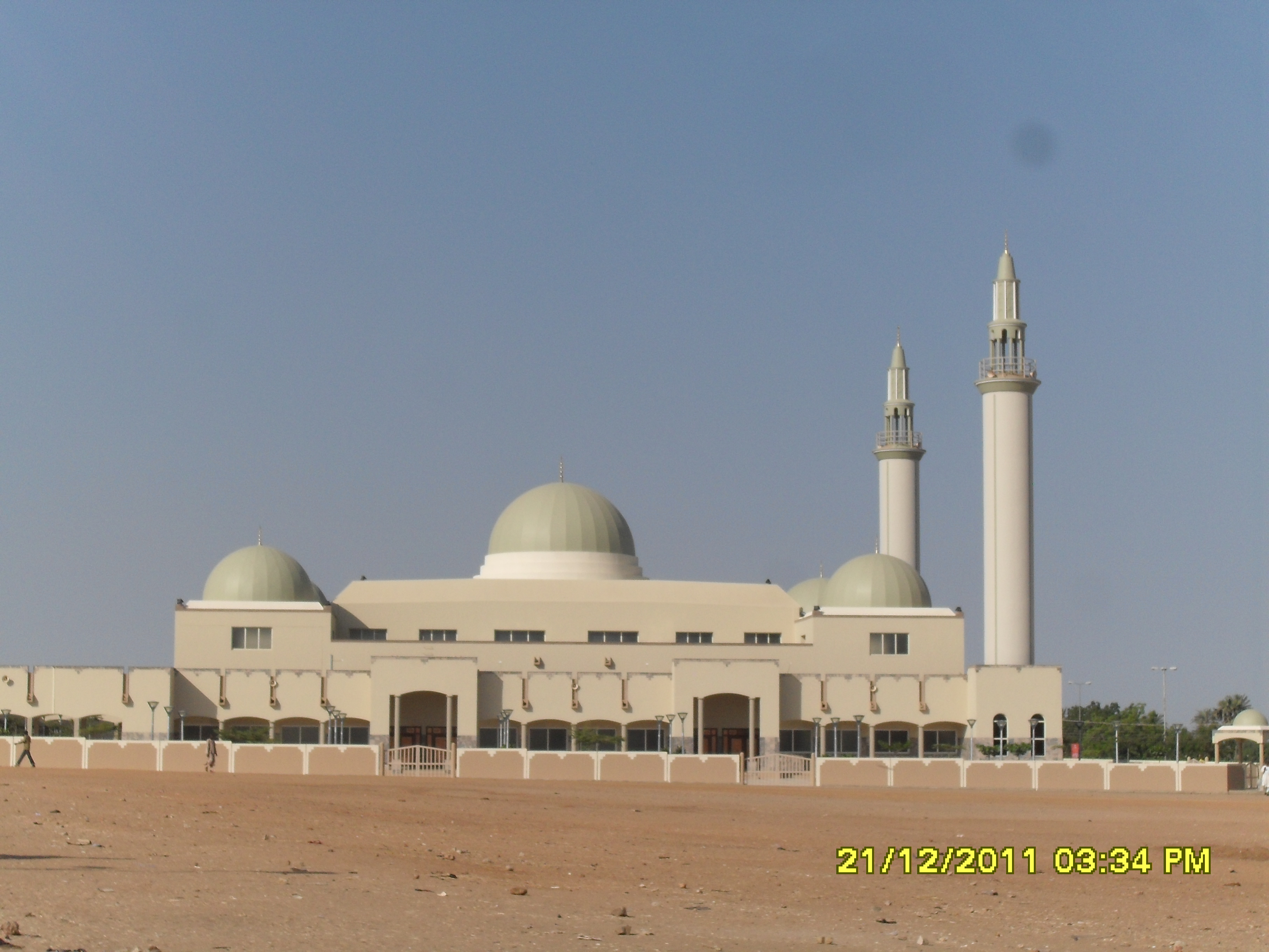 GOMBE CENTRAL MOSQUE NIGERIA